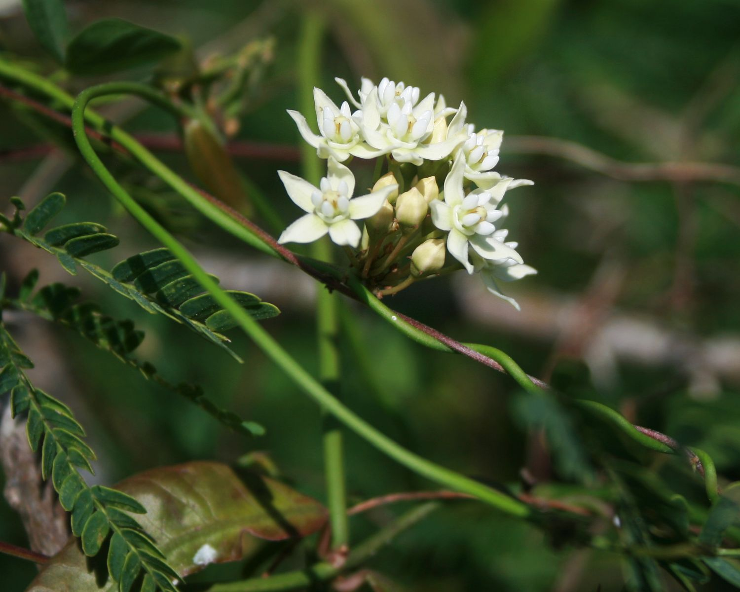 Funastrum glaucum, Hundsgiftgewächse (Apocynaceae), Seidenpflanzengewächse (Asclepiadoideae) – Kolumbien/Colombia: Dpto. Bolívar, Península de Barú SW Cartagena, NE Barú, ca. 5–20 m